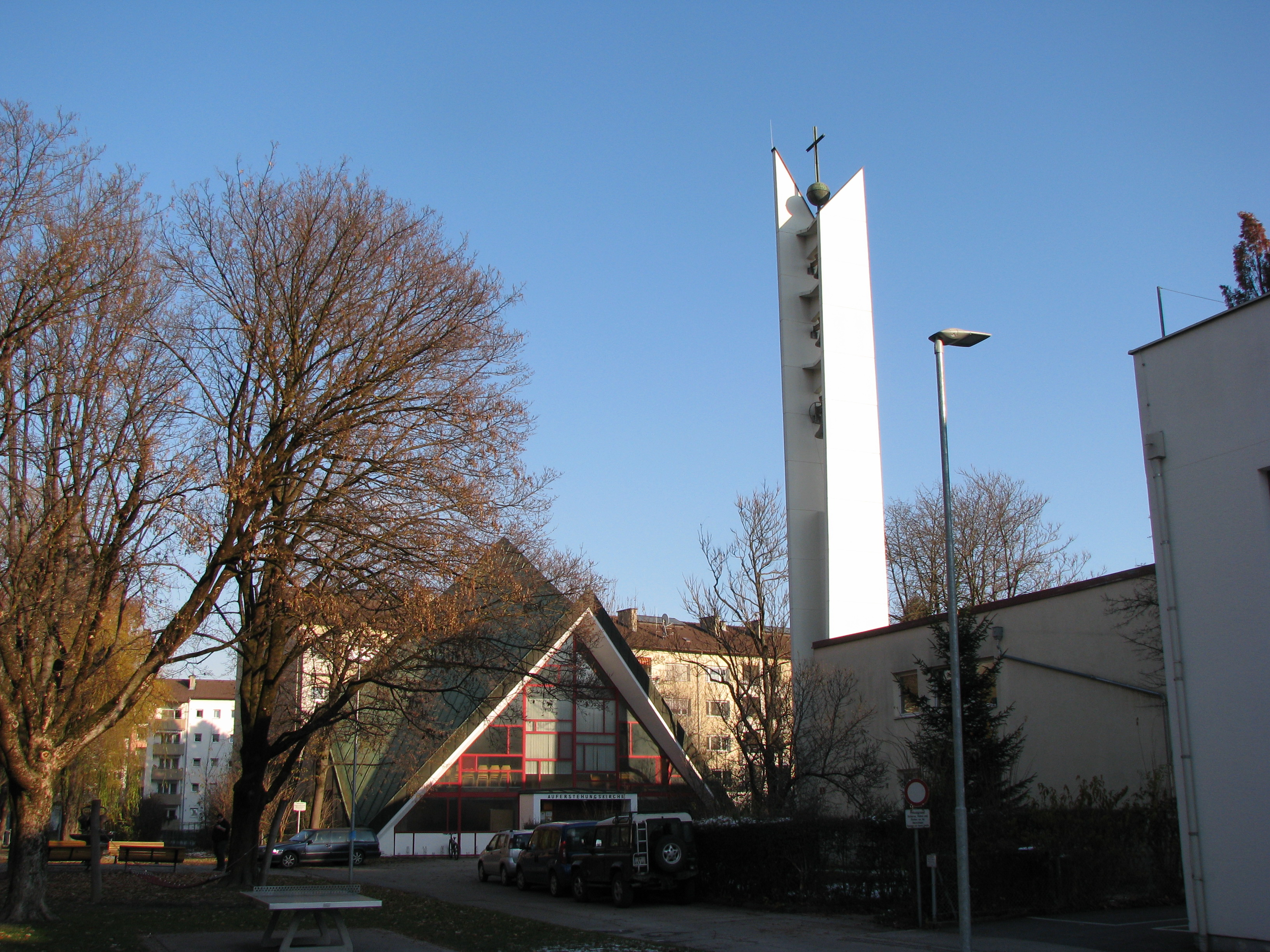 Auferstehungskirche Innsbruck-Reichenau This media shows the remarkable cultural object in the Austrian state of Tyrol listed by the Tyrolean Art Cadastre with the ID 72774. (on tirisMaps, pdf, more images on Commons, Wikidata)